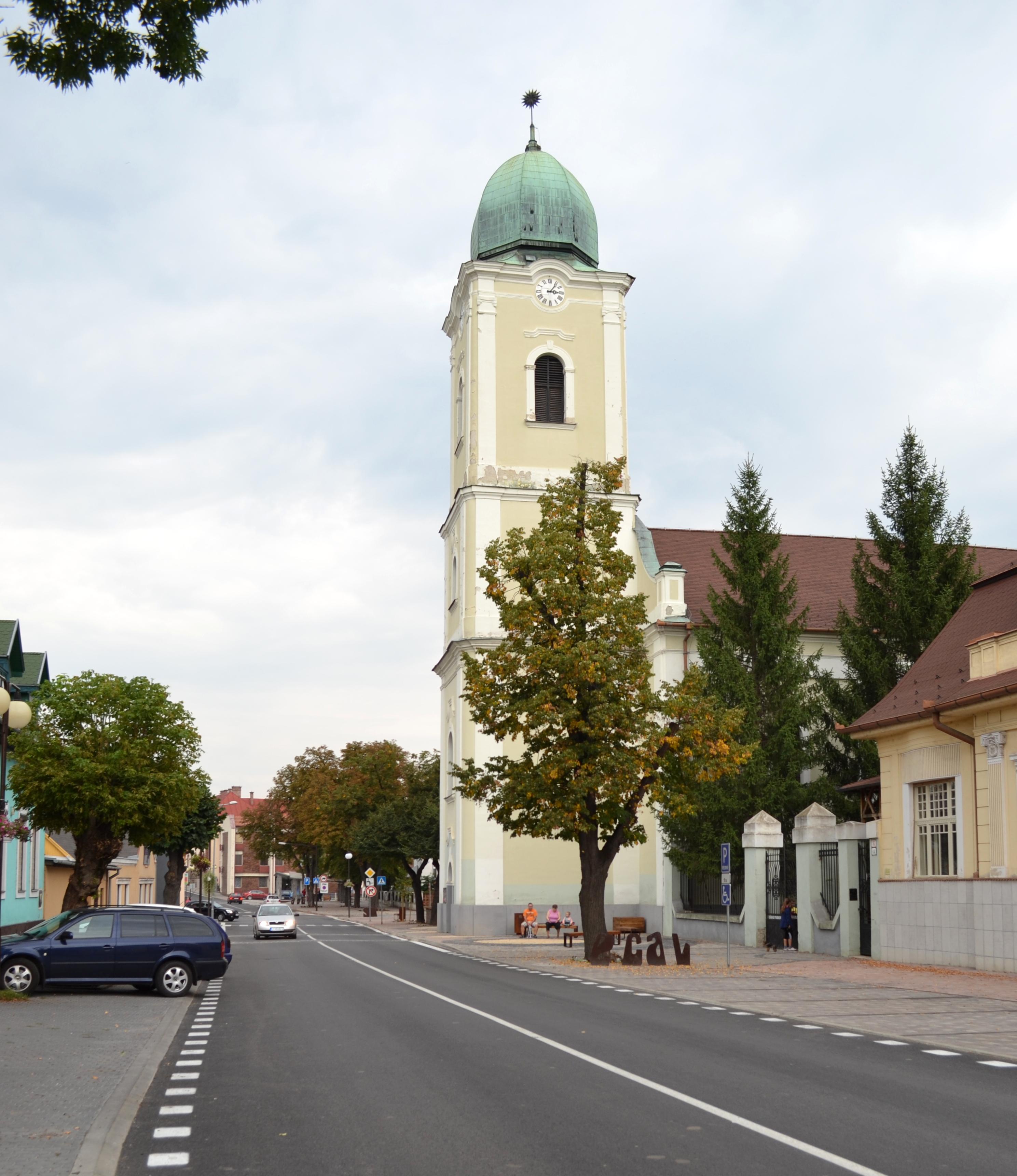 Evanjelický kostol v Lučenci